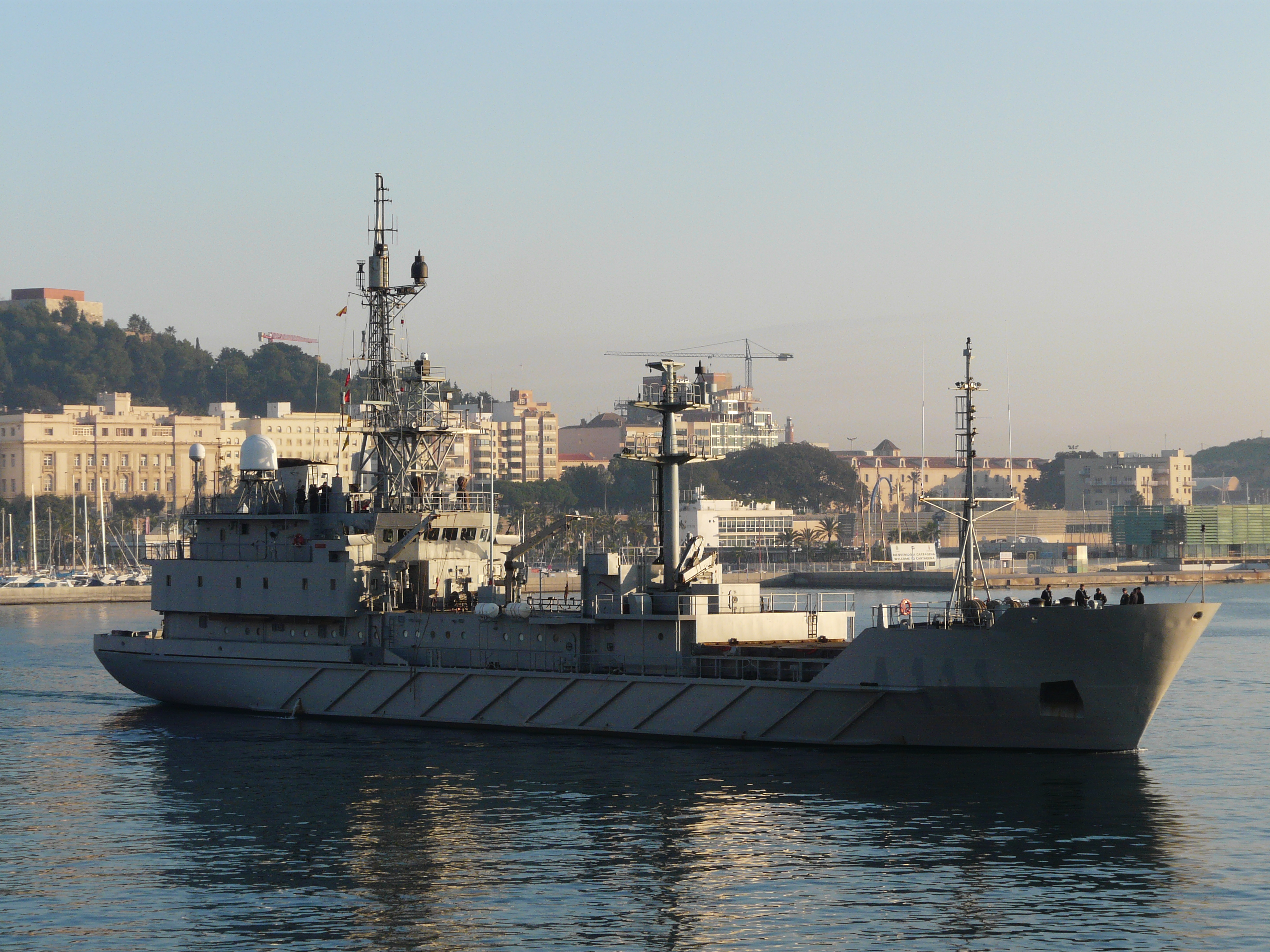 Buque colector de Inteligencia de la Armada Española Alerta (A-111), Ex-Jasmund (Volksmarine, GDR, image from 1986)